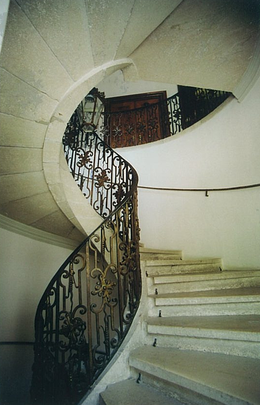 Stift_Heiligenkreuz_Schneckenstiege